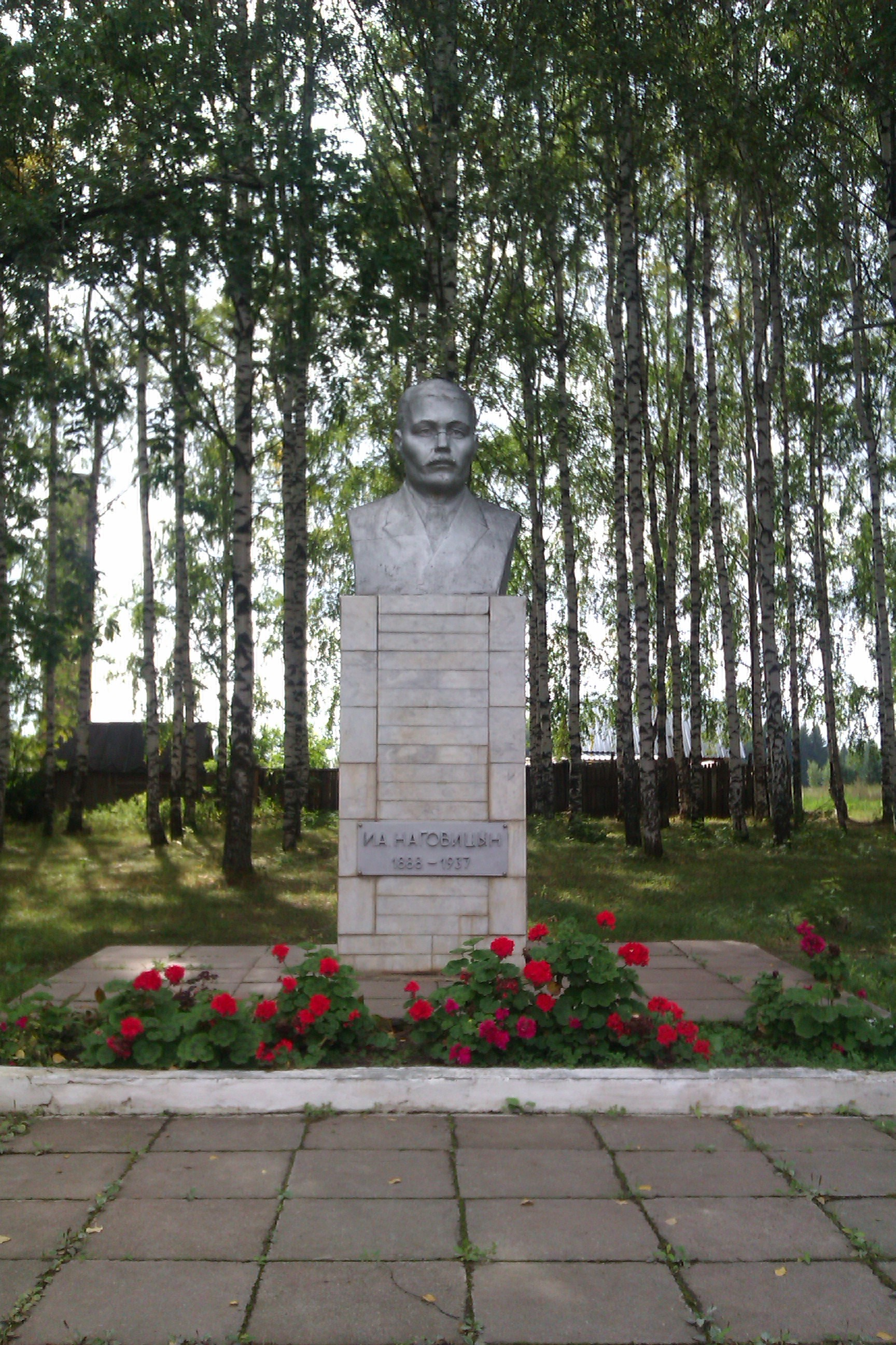 Село Октябрьский, Глазовский район Удмуртской республики. Памятник И.А. Наговицыну около школы